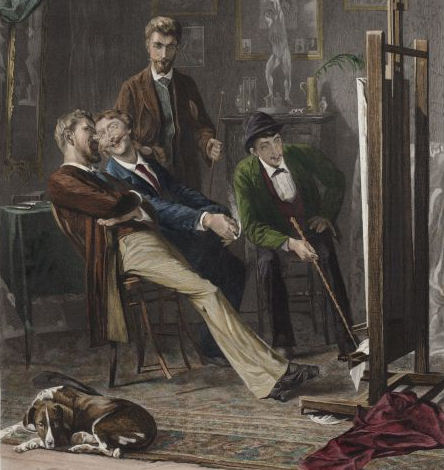 Reproprent naar een schilderij van Nicolaas van der Waay uit omstreeks 1880, voorstellend vier leden van het gezelschap M.A.B. (Michelangelo Buonarroti) in een kunstenaarsatelier. Van links naar rechts: Jan H. Wijsmuller (1855-1925), Van der Waay zelf (1855-1936), Ferdinand Oldewelt (1857-1935) en E.S. Witkamp (1854-1897). De prent werd gemaakt door Willem Steelink Sr. (1826-1913) of Steelink jr. (1856-1928)